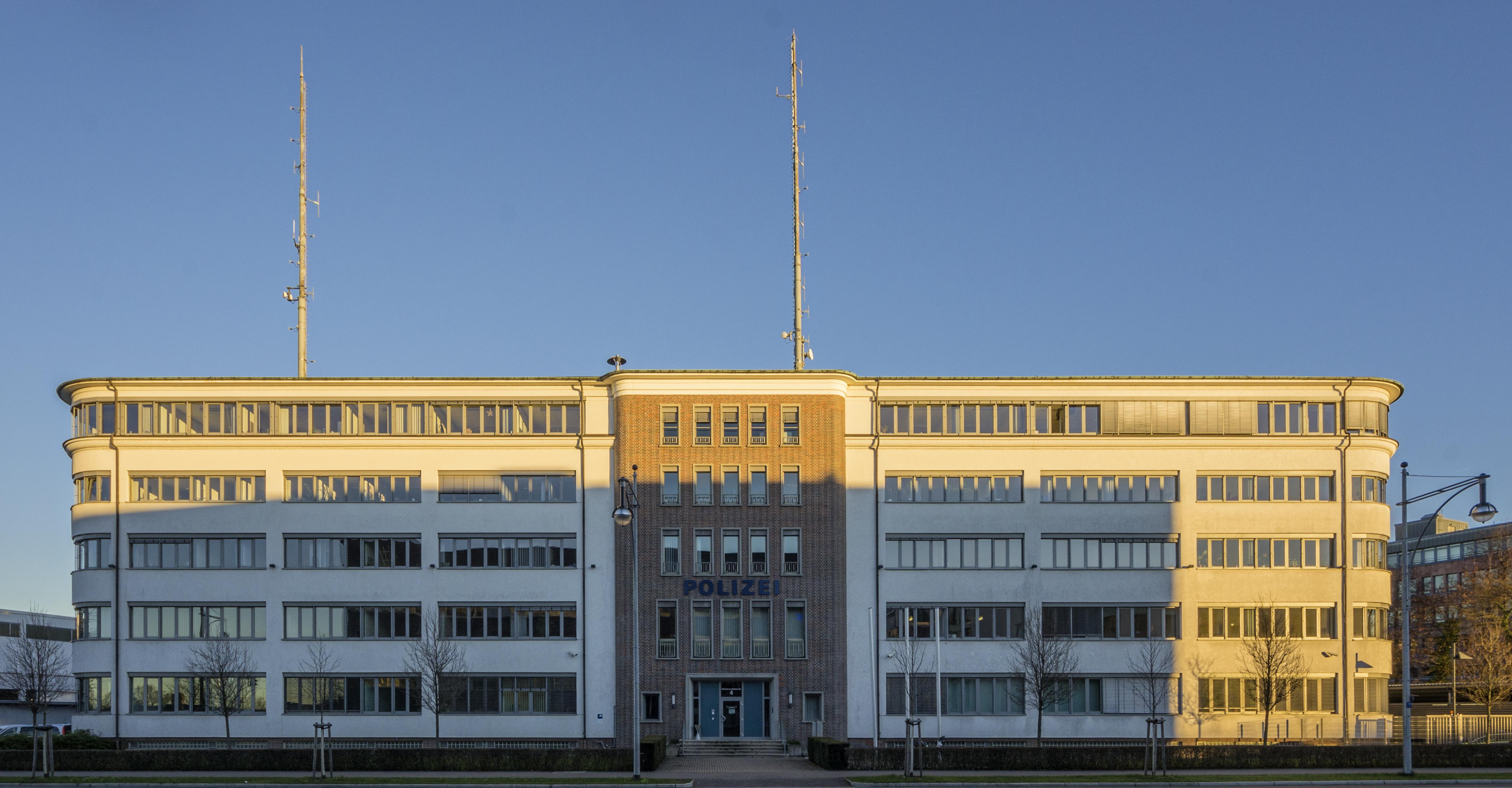 Bilder aus Freiburg Blick auf den Gebäudekomplex in der Heinrich von Stephan Strasse der auch das Polizeipräsidium beherbergt